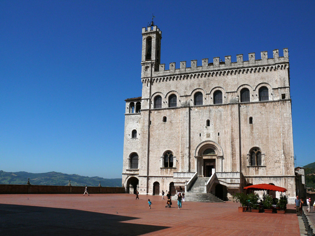 Gubbio: Palazzo dei Consoli